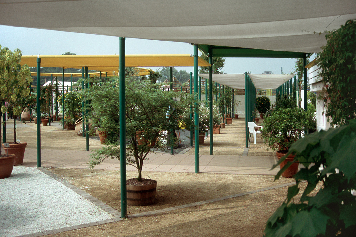 Trotz der leichten Konstruktionen ergaben sich intime gärtnerische Ausstellungsräume